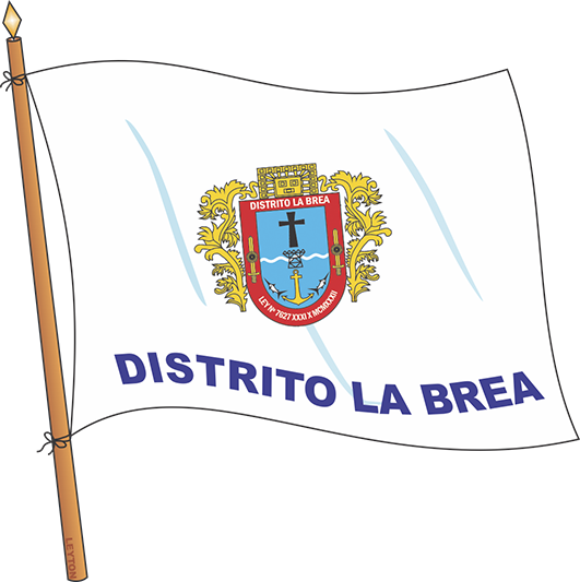 Bandera La Brea